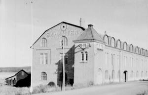 Sahanterä Oy:n rakennus Epilässä 1930-luvulla. Kuva: Mauno Mannelin, Tampereen museoiden kuva-arkisto.